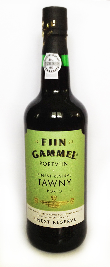 Fiin Gammel Portviin 2015